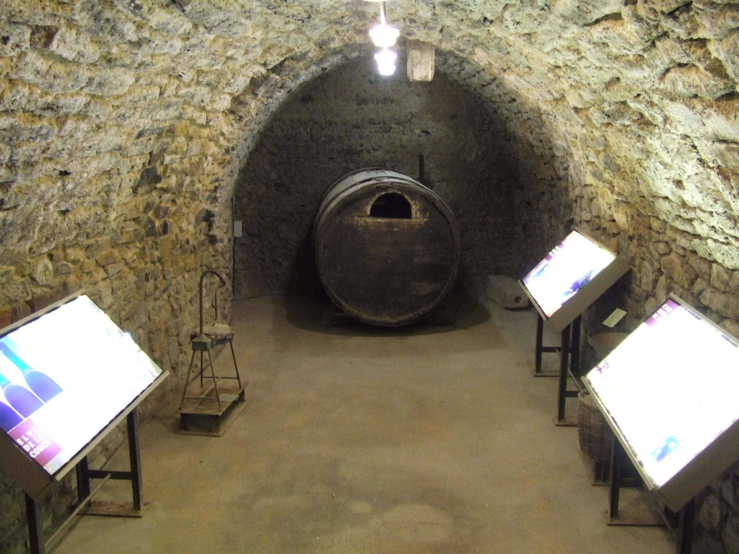 Museu de la Conca Dellà (Isona, Pallars Jussà) Antic celler, dedicat a la vinya i al vi